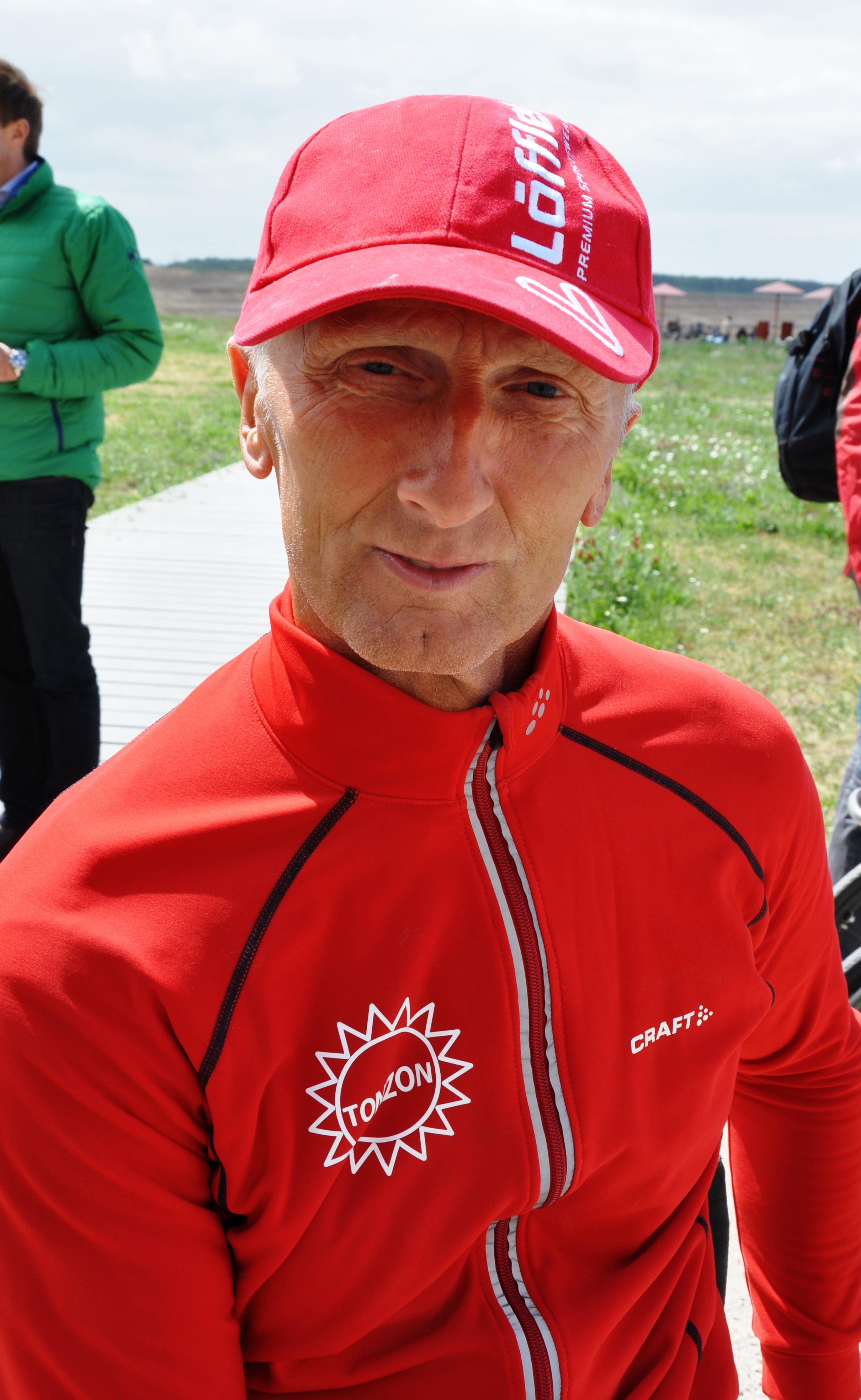 Johan Reekers, Dutch para-cyclist